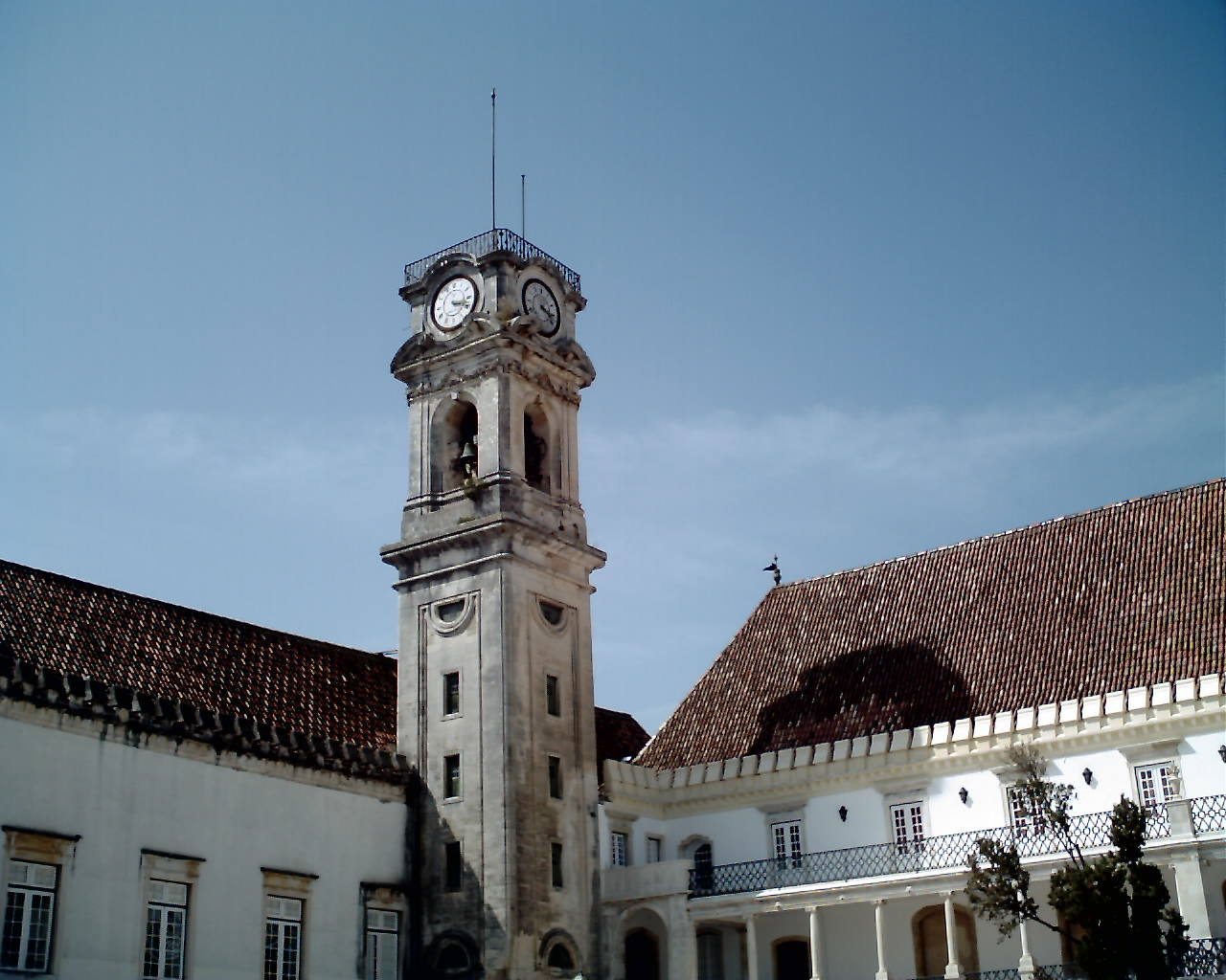 Coimbra Üniversitesi - Faculdade de Letras yanındaki saat kulesinden çektiğim görüntü.